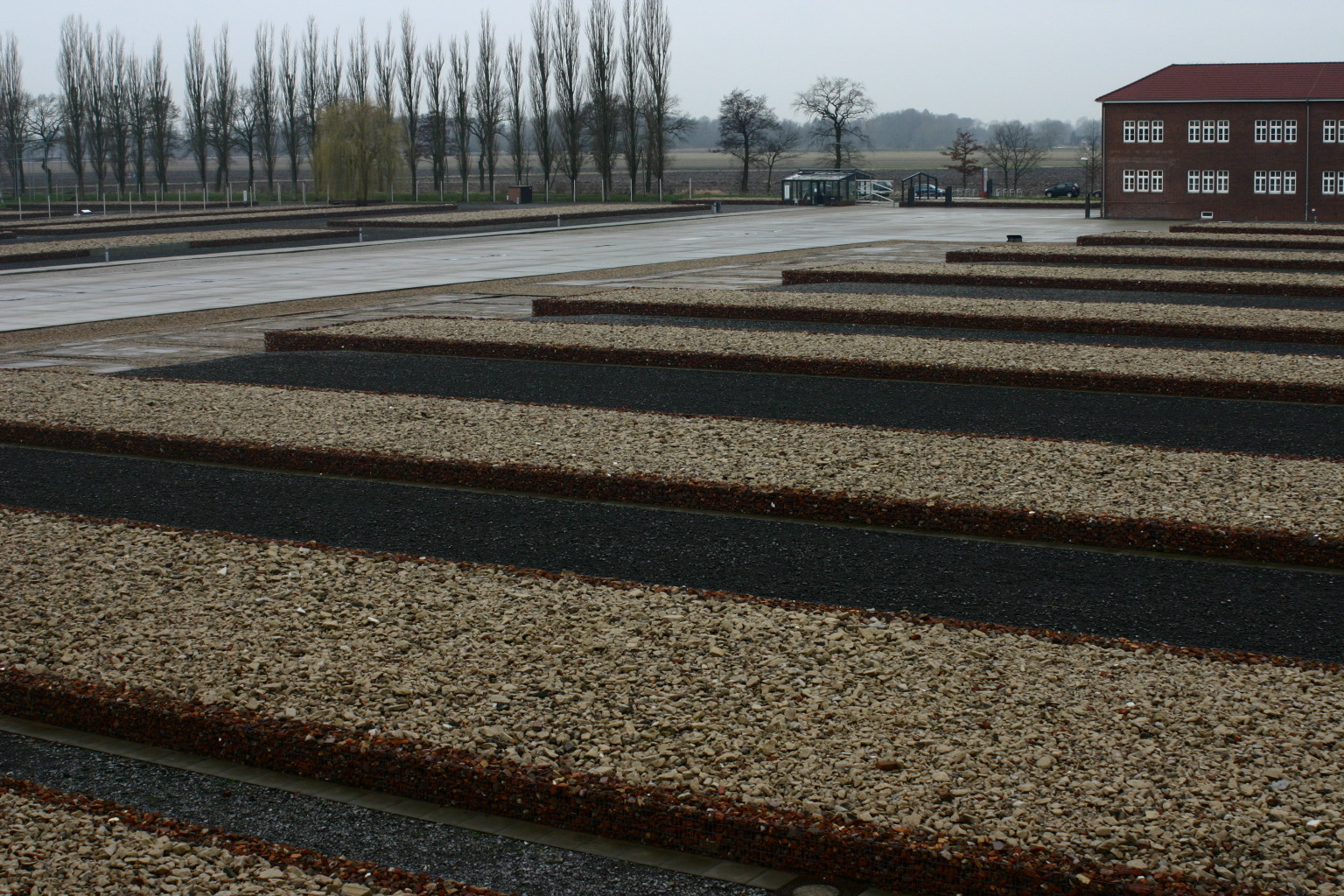 Neue Gestaltung des Stammlagers Neuengamme